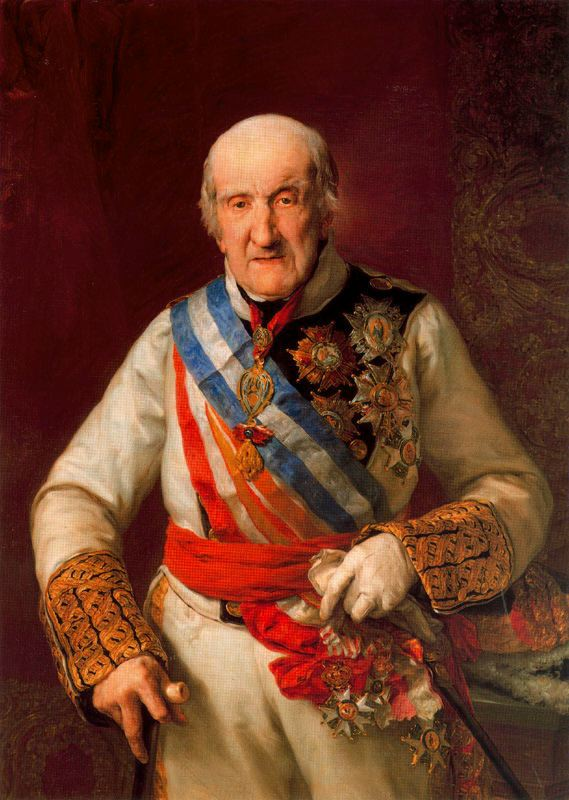 Retrato del anciano general Francisco Javier Castaños (1758-1852), héroe de la batalla de Bailén y realizado hacia 1848, cuatro años de la muerte del retratado y durante el reinado personal de Isabel II de España.